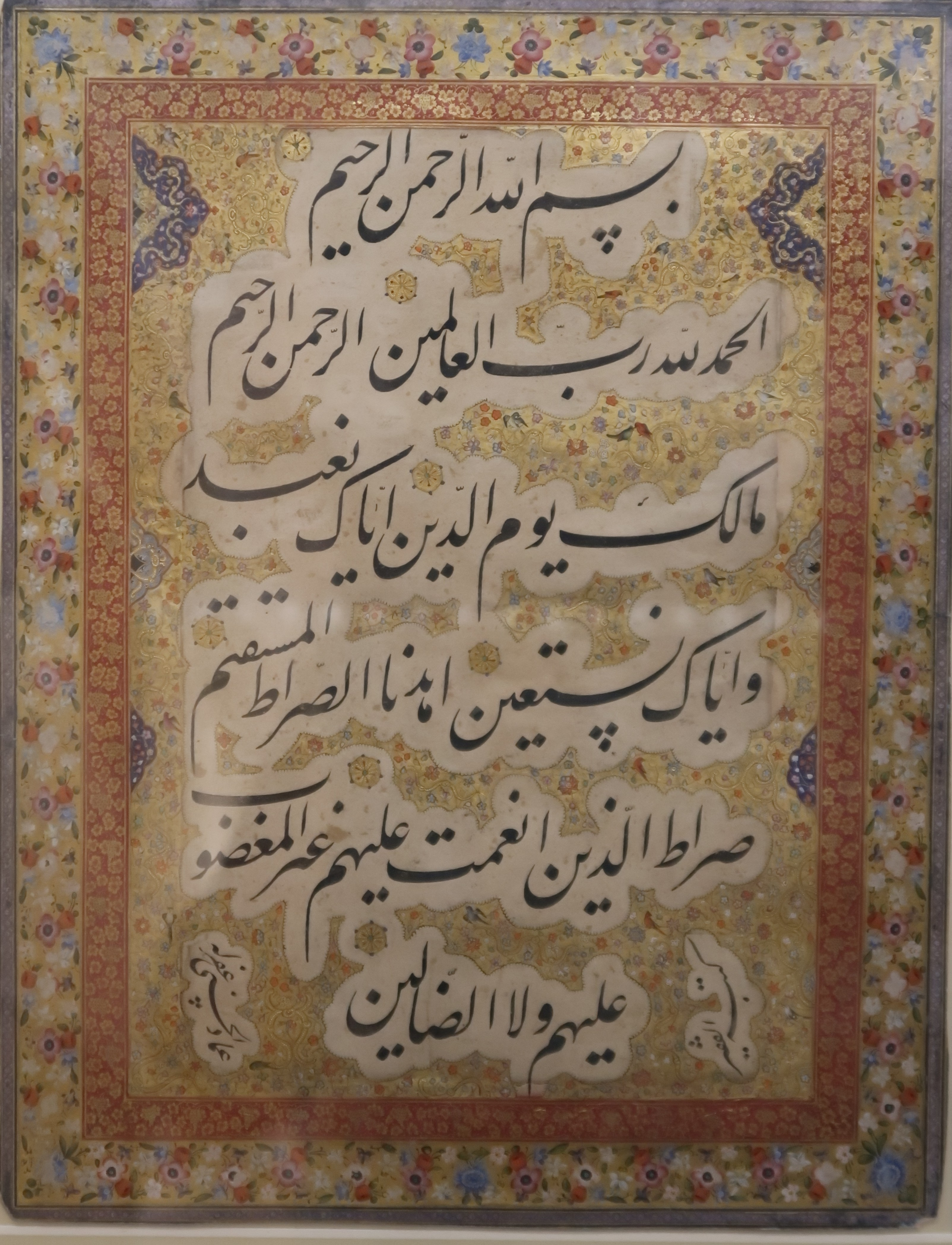 خط نستعلیق - میرعماد - سال۱۰۱۲ هجری قمری- موزه ایران باستان - سوره حمد